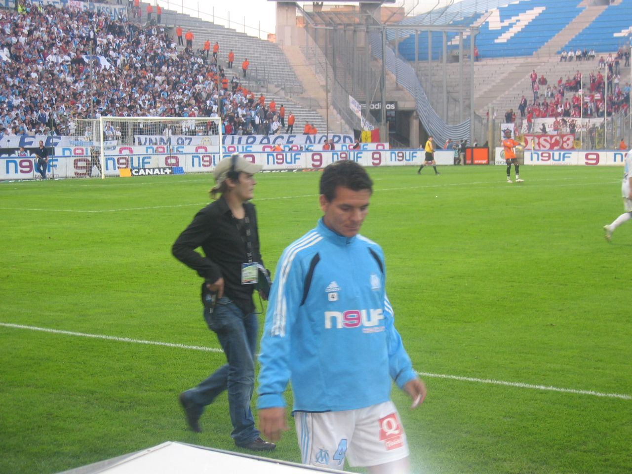 Demetrius Ferreira, match OM-Lille du 29 octobre 2005 (Ligue 1)